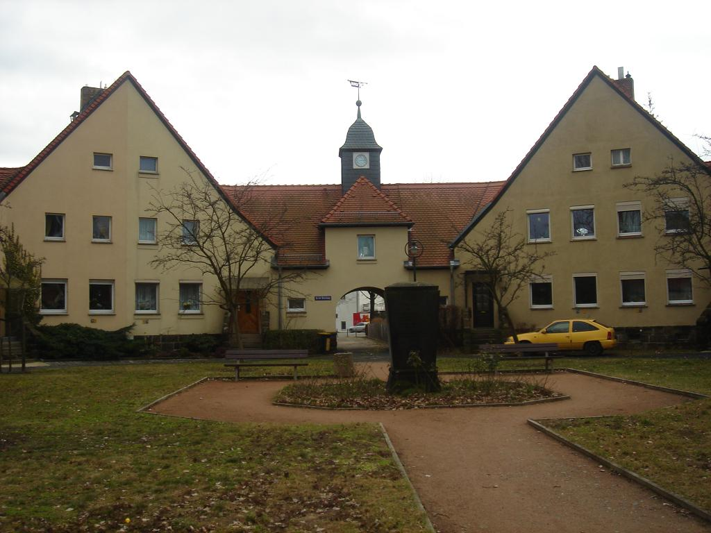 Kriegersiedlung Dresden-Trachau